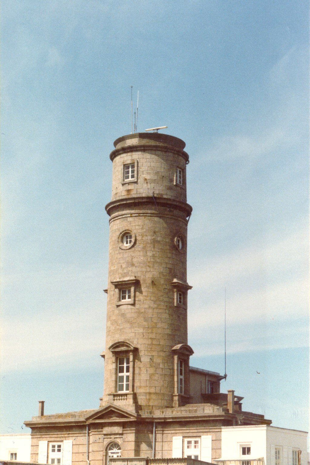 Sémaphore du Phare de Gatteville